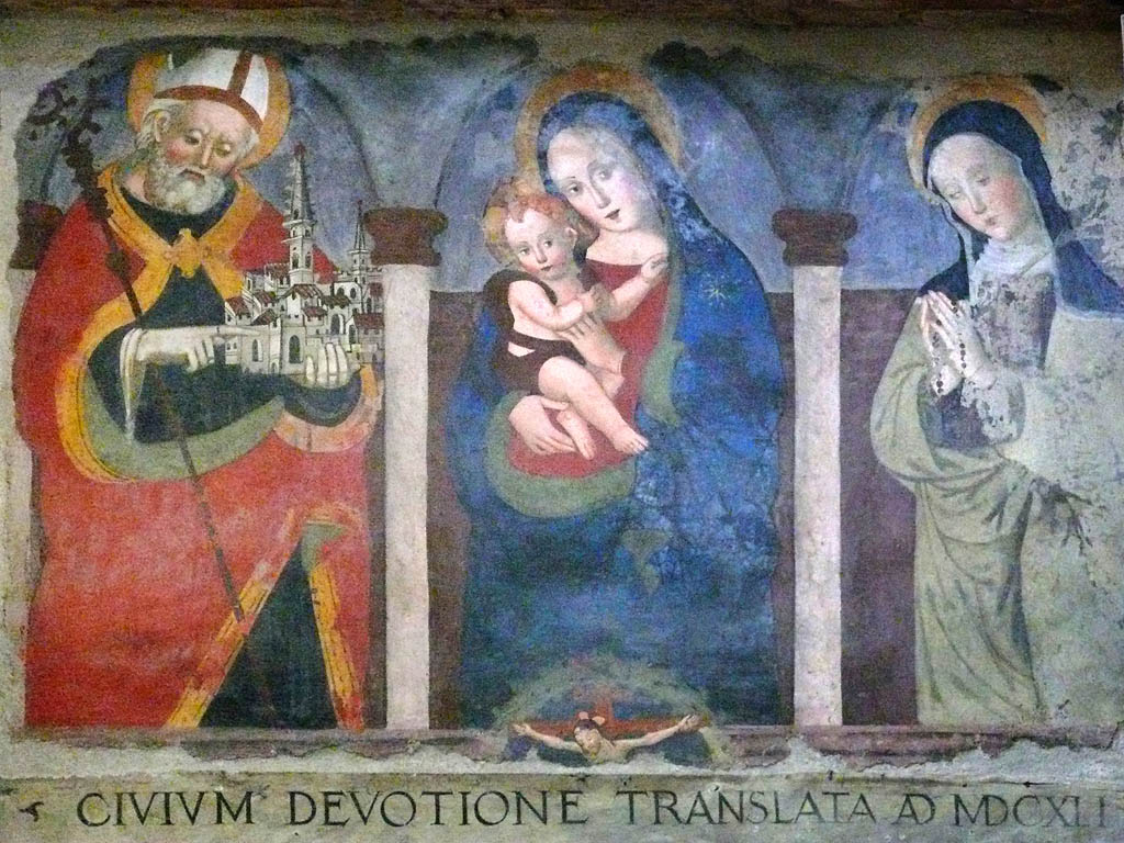 Madonna con Bambino, san Benedetto da Norcia e una santa. Affresco, Norcia, San Benedetto church.